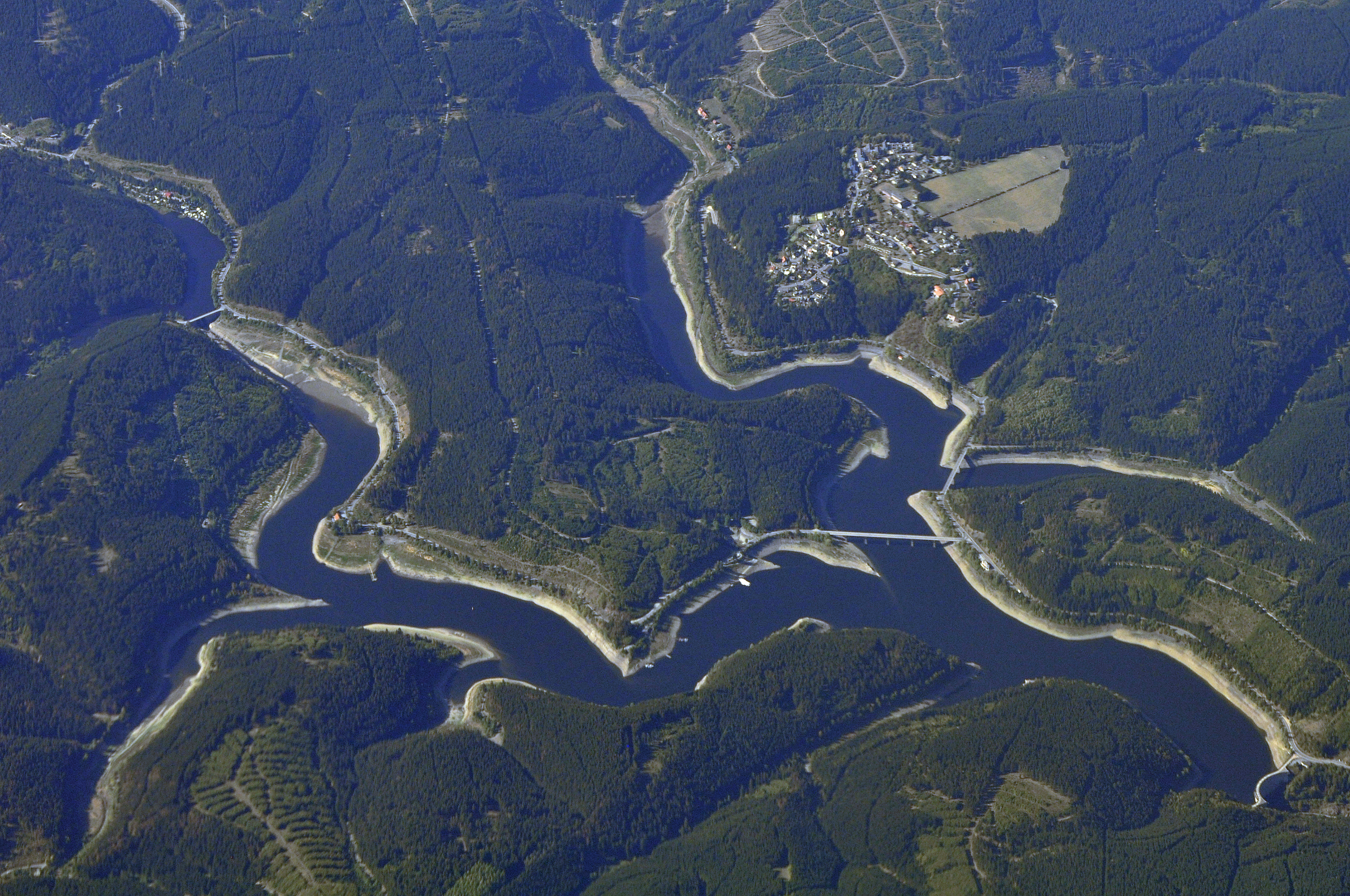 Okertalsperre, Luftaufnahme aus einem Linienflugzeug.